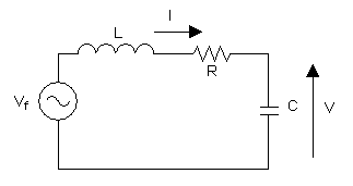 Driven LRC circuit. 2006